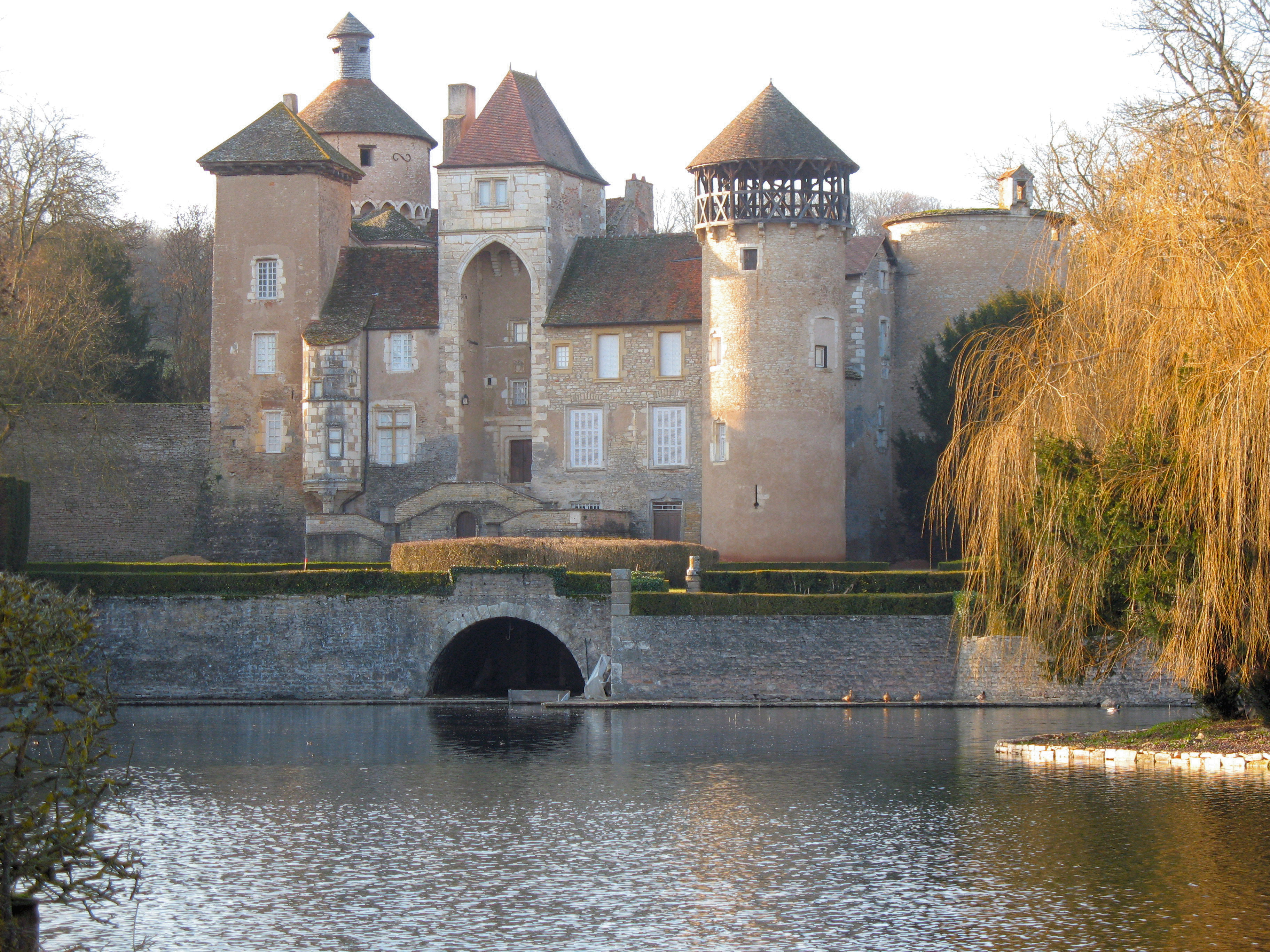 château de Sercy (Saône-et-Loire)